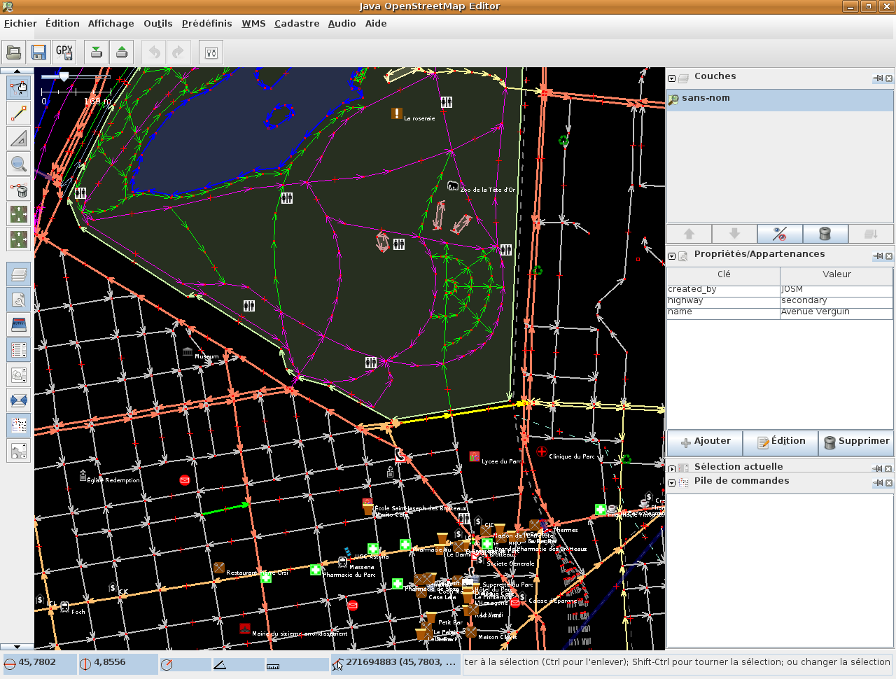 JOSM editor